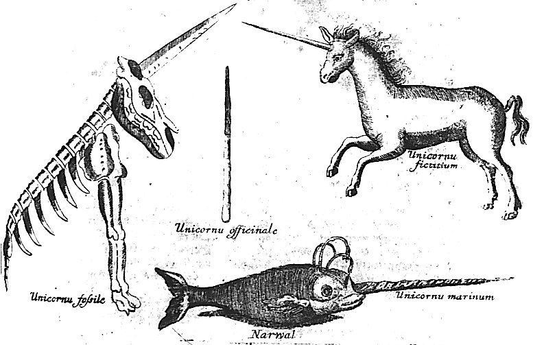 Museum Museorum ou théâtre complet de tous les médicaments et épices, avec la manière de les choisir, leurs qualités distinctives, leur utilité et leur emploi, puisé dans les musées et les magasins d’épices, d’objets d’art et d’histoire naturelle, les descriptions de voyages aux Indes orientales et occidentales, les recueils curieux d’observations météorologiques, les ouvrages des naturalistes et des médecins, et dans sa propre expérience, rédigé à l’usage de la jeunesse des écoles, des droguistes, des pharmaciens, des inspecteurs de pharmacie, ainsi que d’autres artisans tels que joailliers, peintres, teinturiers, etc... Page "licorne" Publié à Francfort par Michele Bernardo Valentini